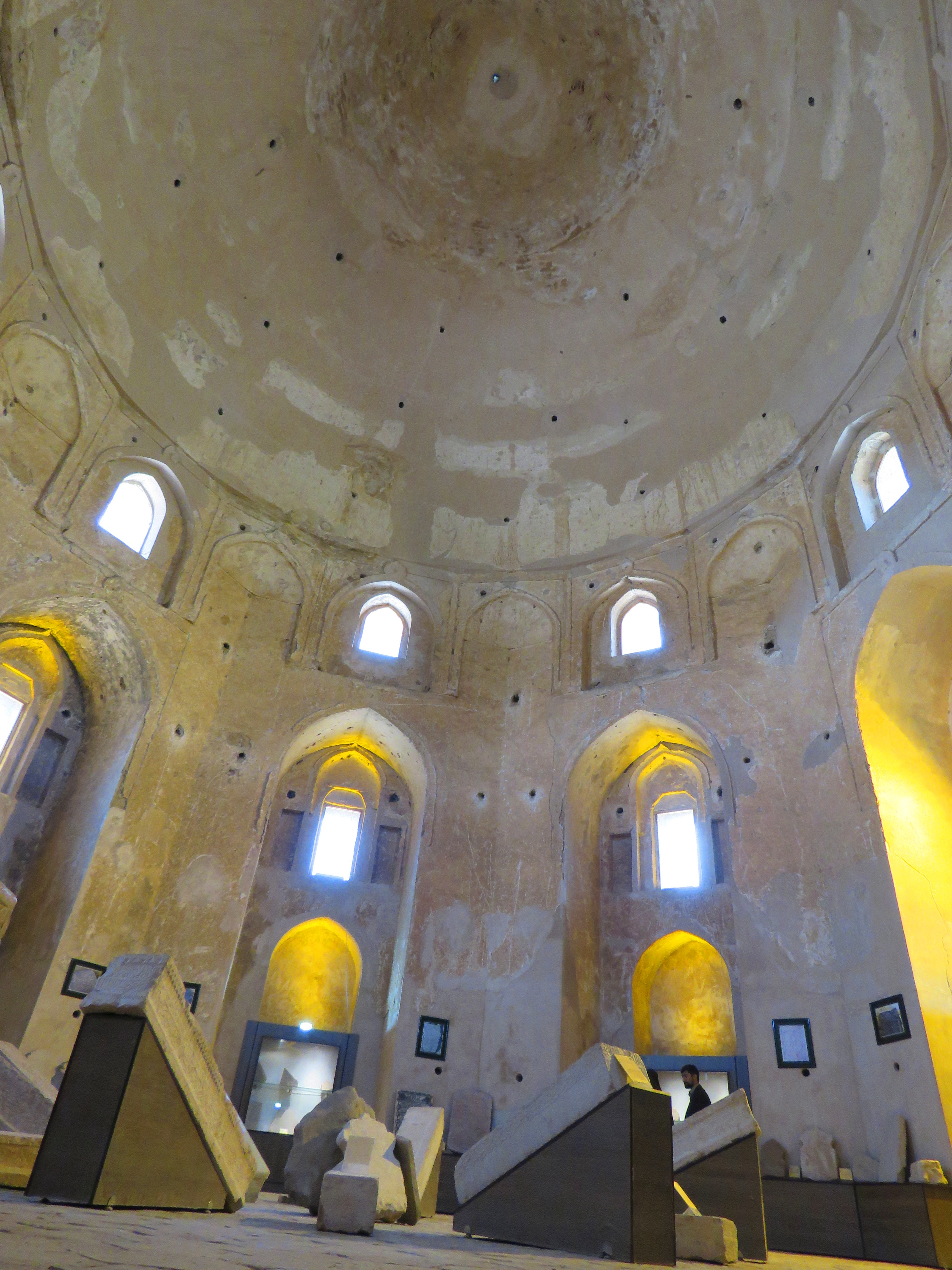 گنبد گبری